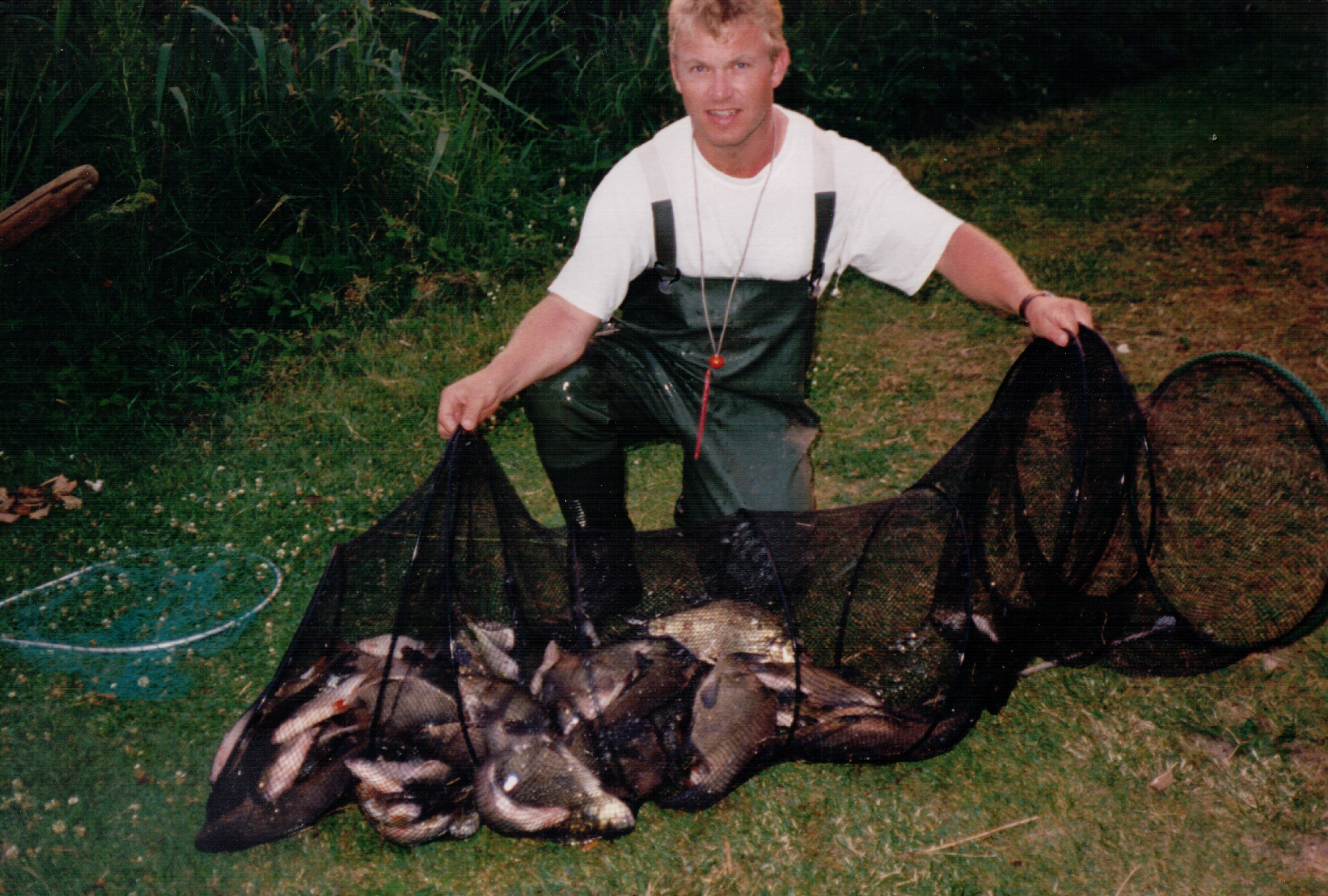 Eksempel på konkurrence i medefiskeri, hvor det gælder om at fange flest kilo. Skanderborg sø.